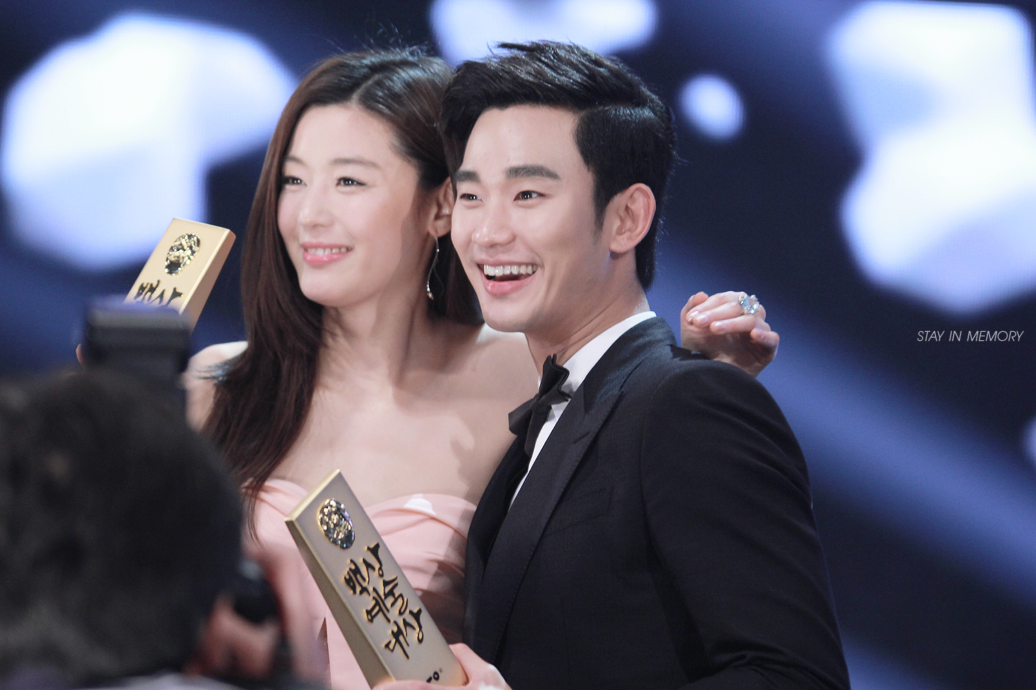 2014 백상예술대상.